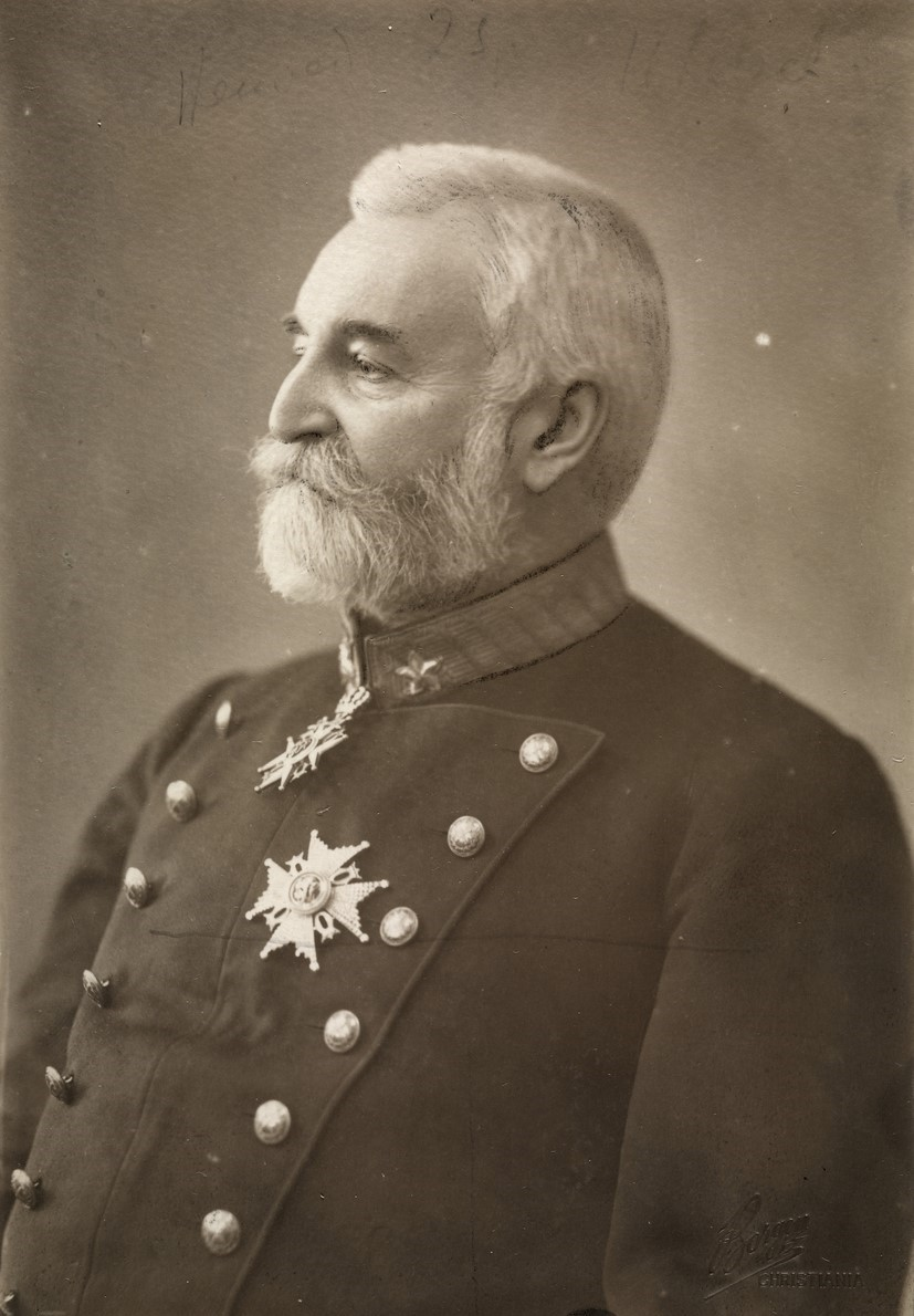 Haakon Ditlef Lowzow (1854–1915), generalmajor og sjef for kavaleriet, forsvarsminister (V).